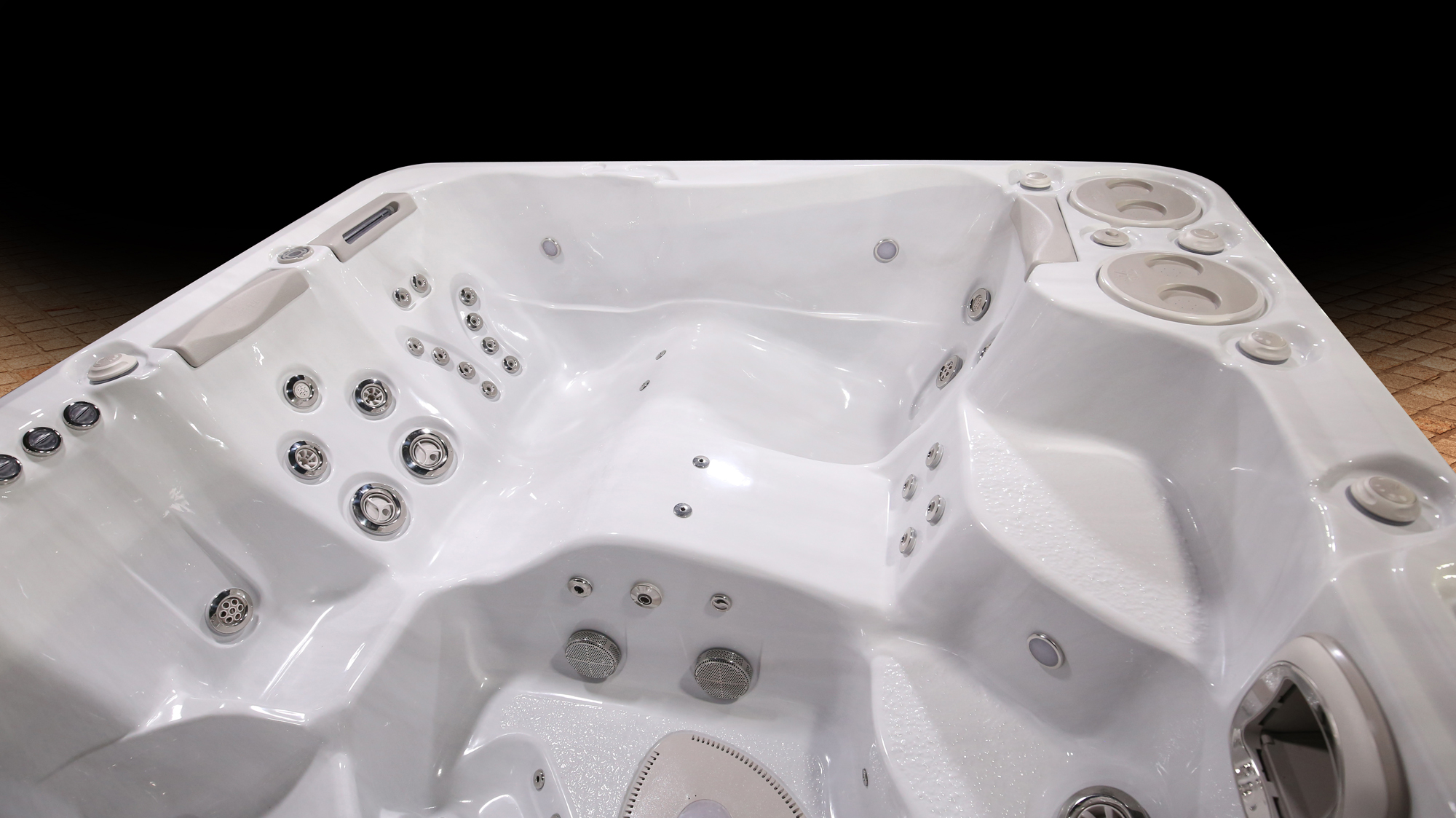 Detailní pohled na trysky